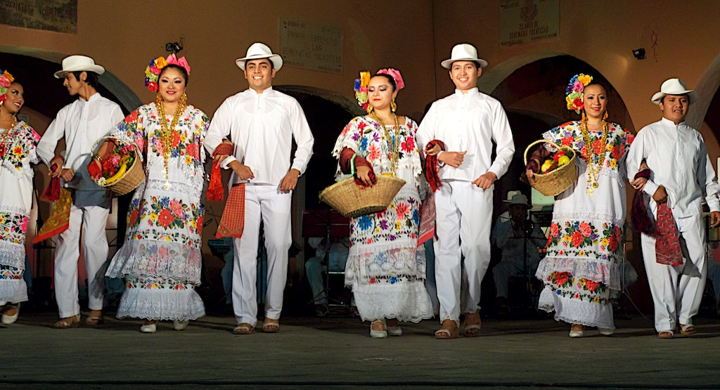 Conjunto jaranero del ayuntamiento de Mérida en la Plaza de Santa Lucía, en Mérida, Yucatán, México.